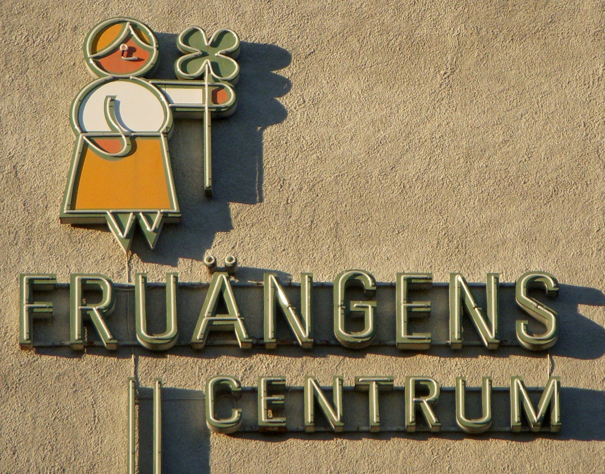 Fruängen och Fruängens centrum, logo